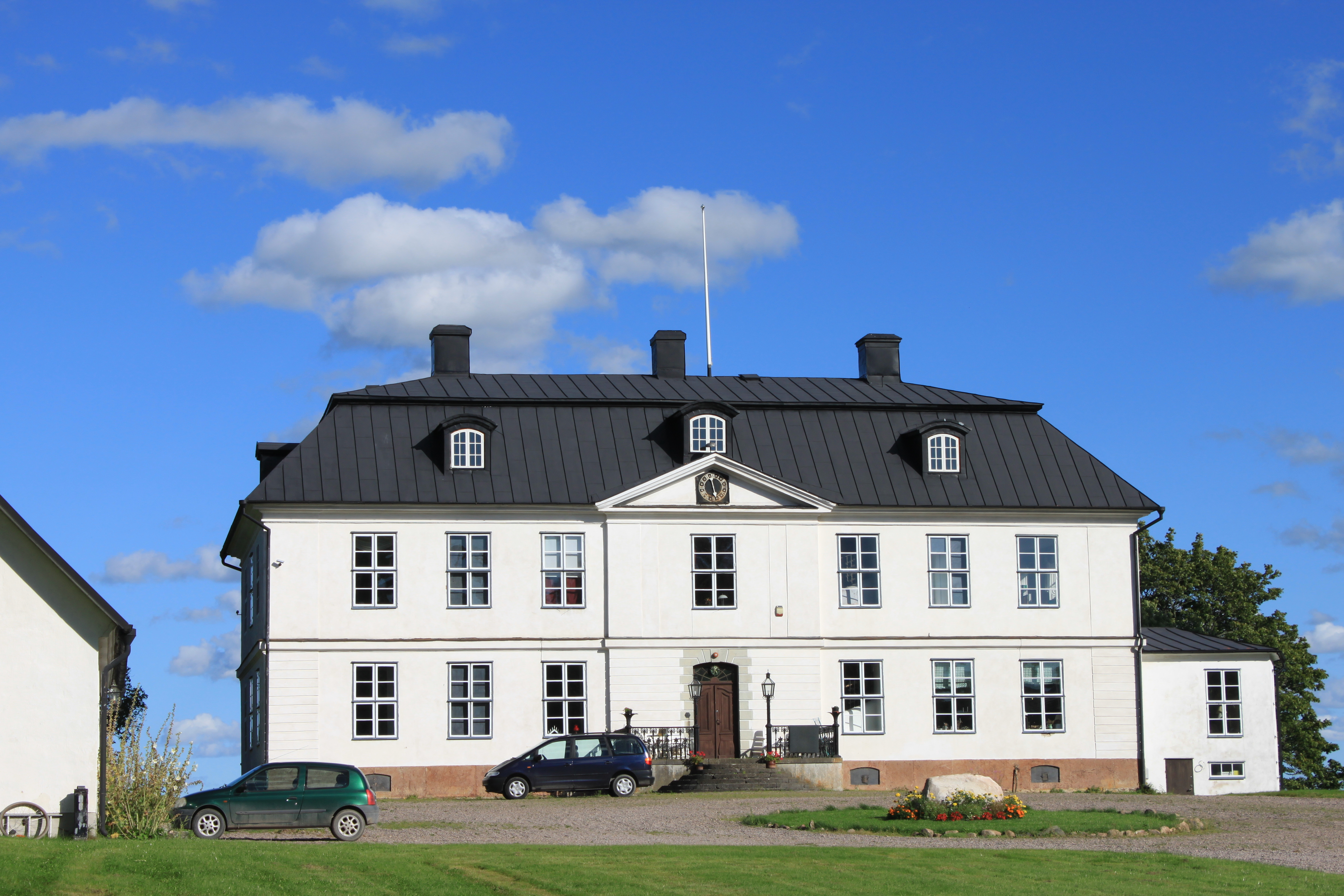 Sveneby herrgård. (Sveneby 1:4).